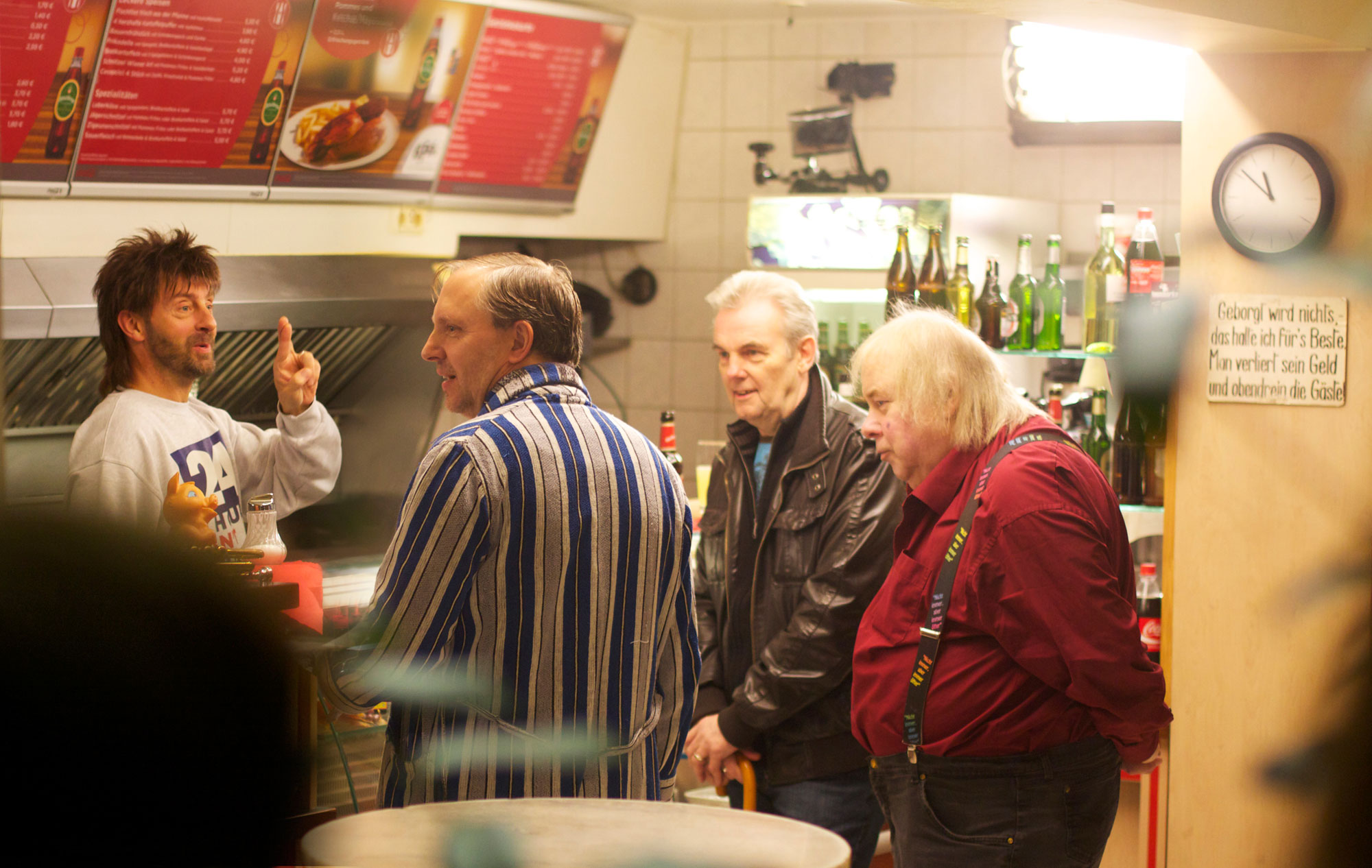 Nach der Sendung (von links): Jon Flemming Olsen, Olli Dittrich, Knut Hartmann, Franz Jarnach